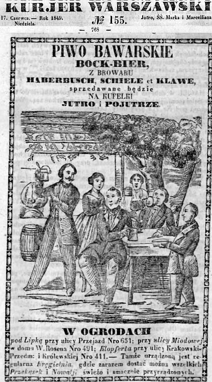 ogłoszenie z Kuriera Warszawskiego pochodzące z Domeny Publicznej